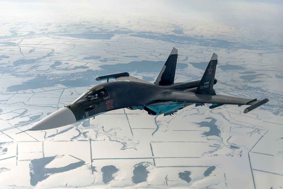 Дозаправка в воздухе Су-34 47-го смешанного авиационного полка во время лётно-тактических учений в Бутурлиновке.